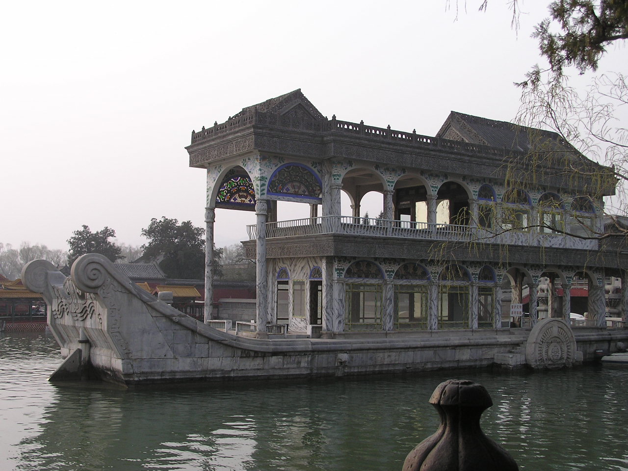 Мраморная ладья в Пекине (1755). Мраморная ладья. Мраморная ладья императора Цяньлуна.